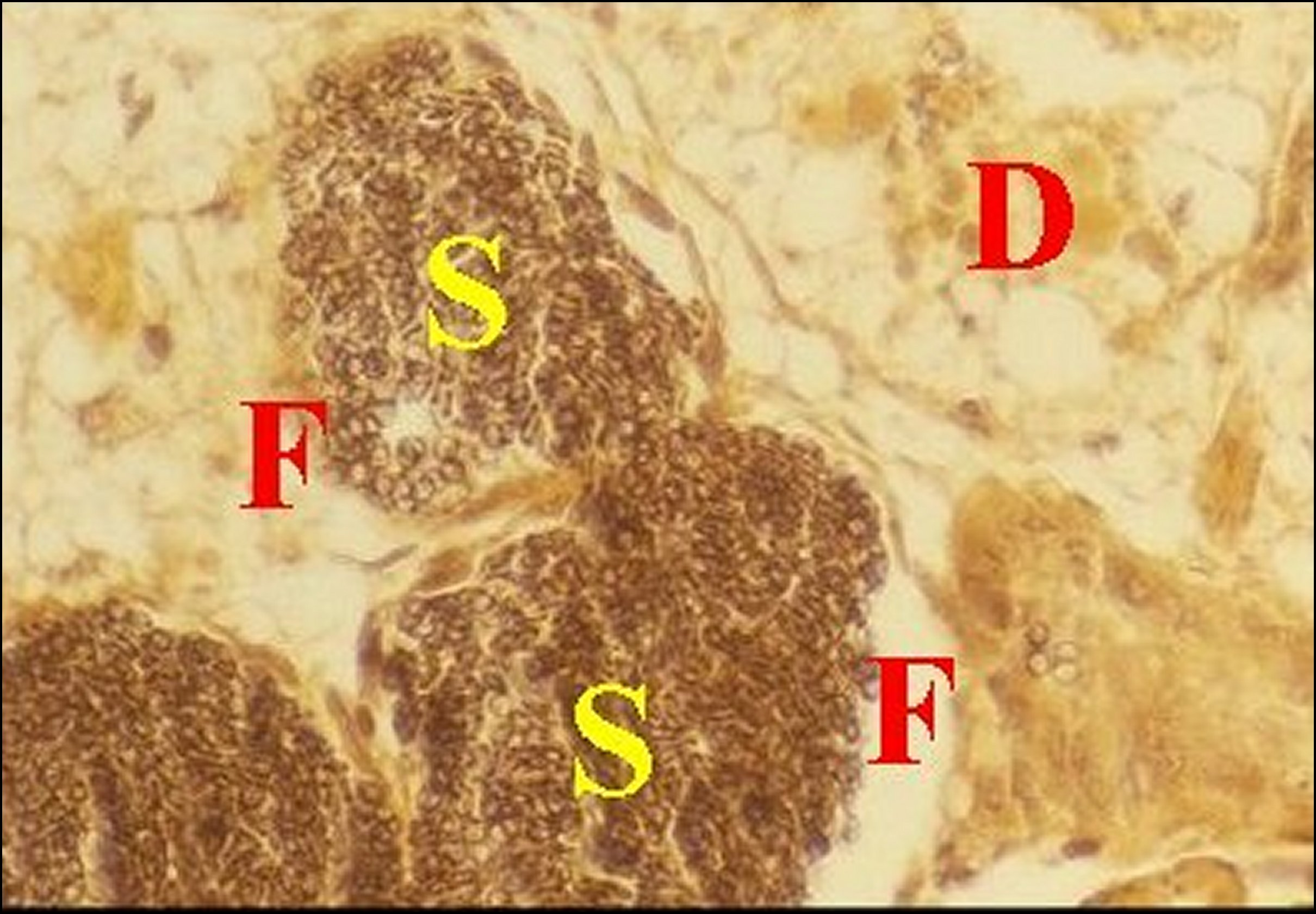 Spermatozoïdes emplissant le canal déférent d'un mâle de Mastophora venant de sortir du cocon.